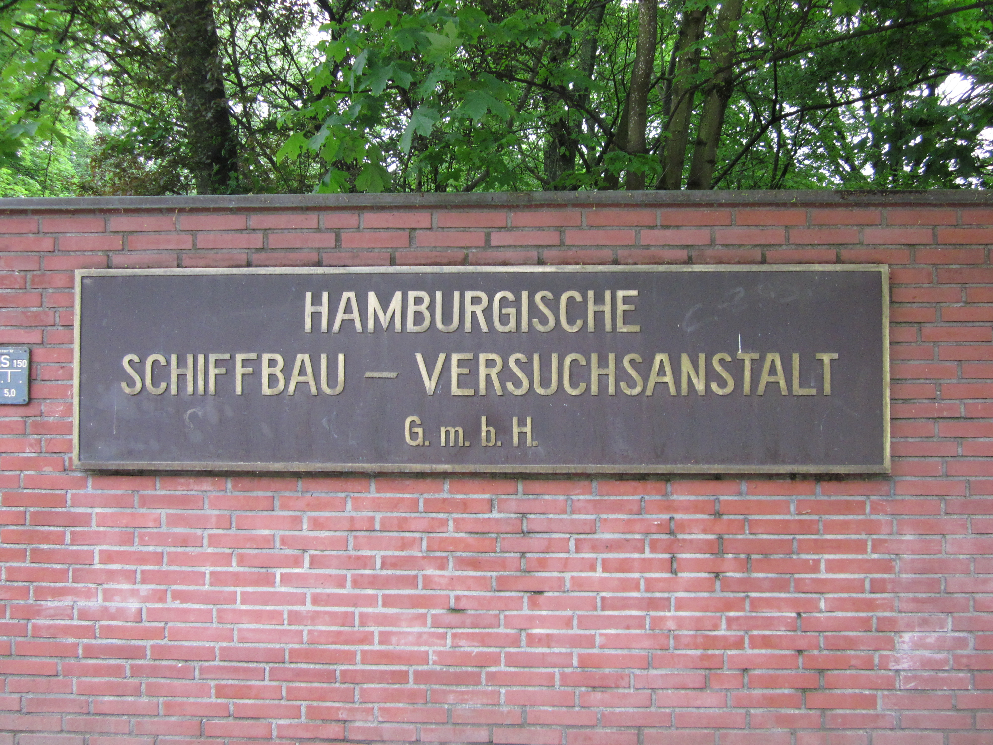 Firmenschild der Hamburgischen Schiffbau-Versuchsanstalt in der Bramfelder Straße 164 in Barmbek-Nord.